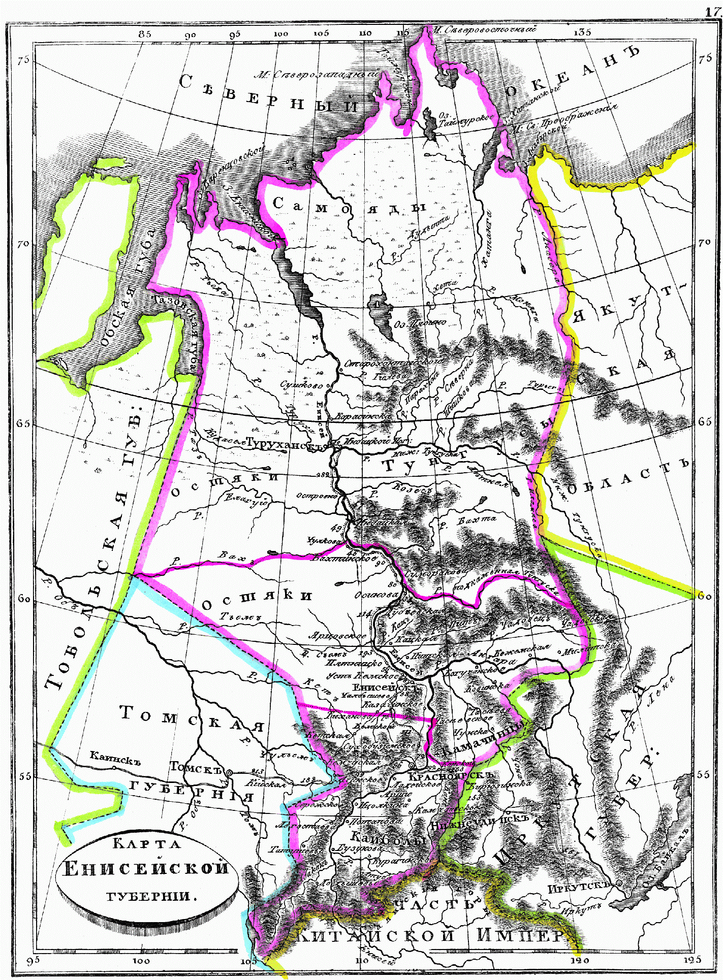 Карта Енисейской губернии, 1835